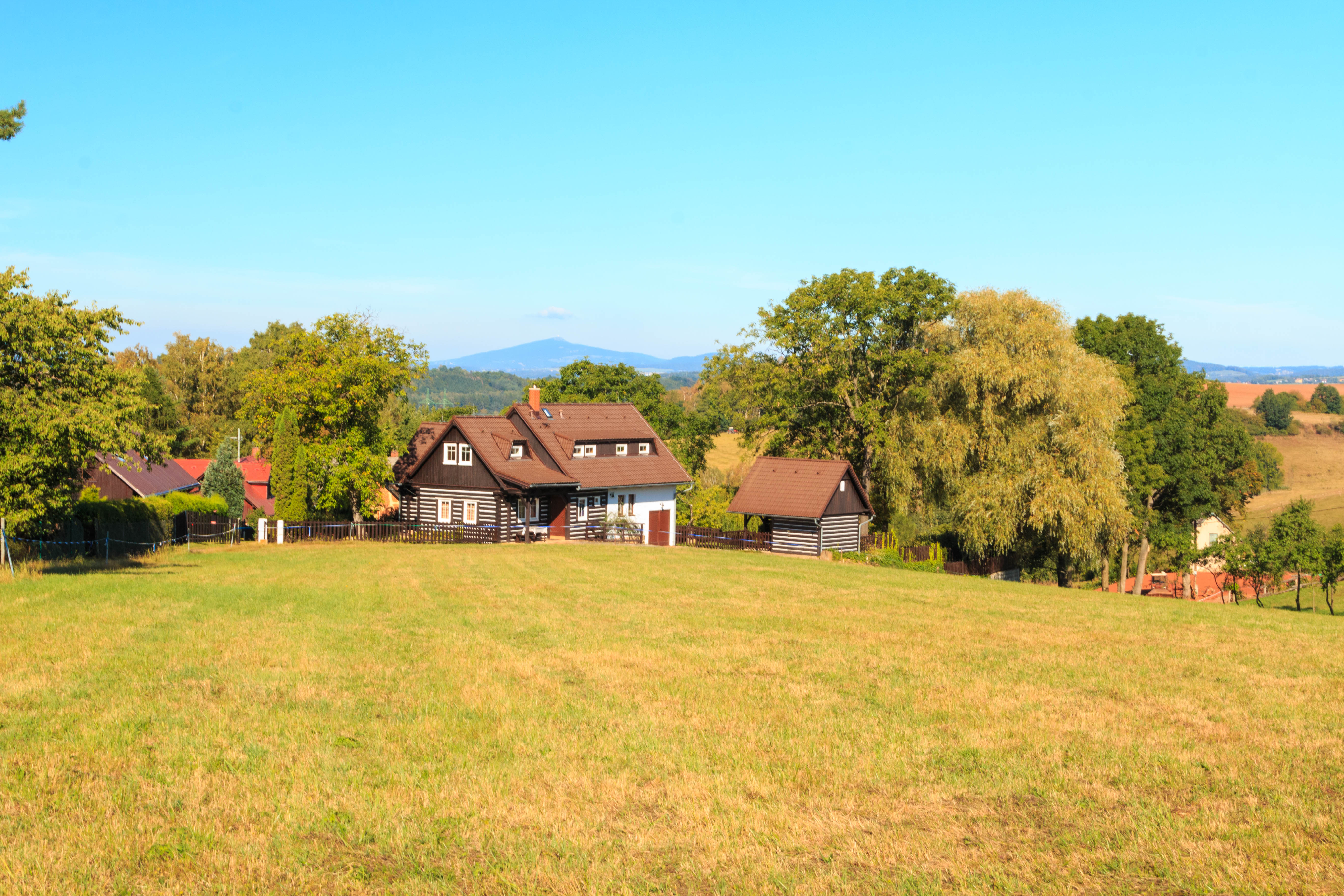 Liščí Kotce - čp. 11